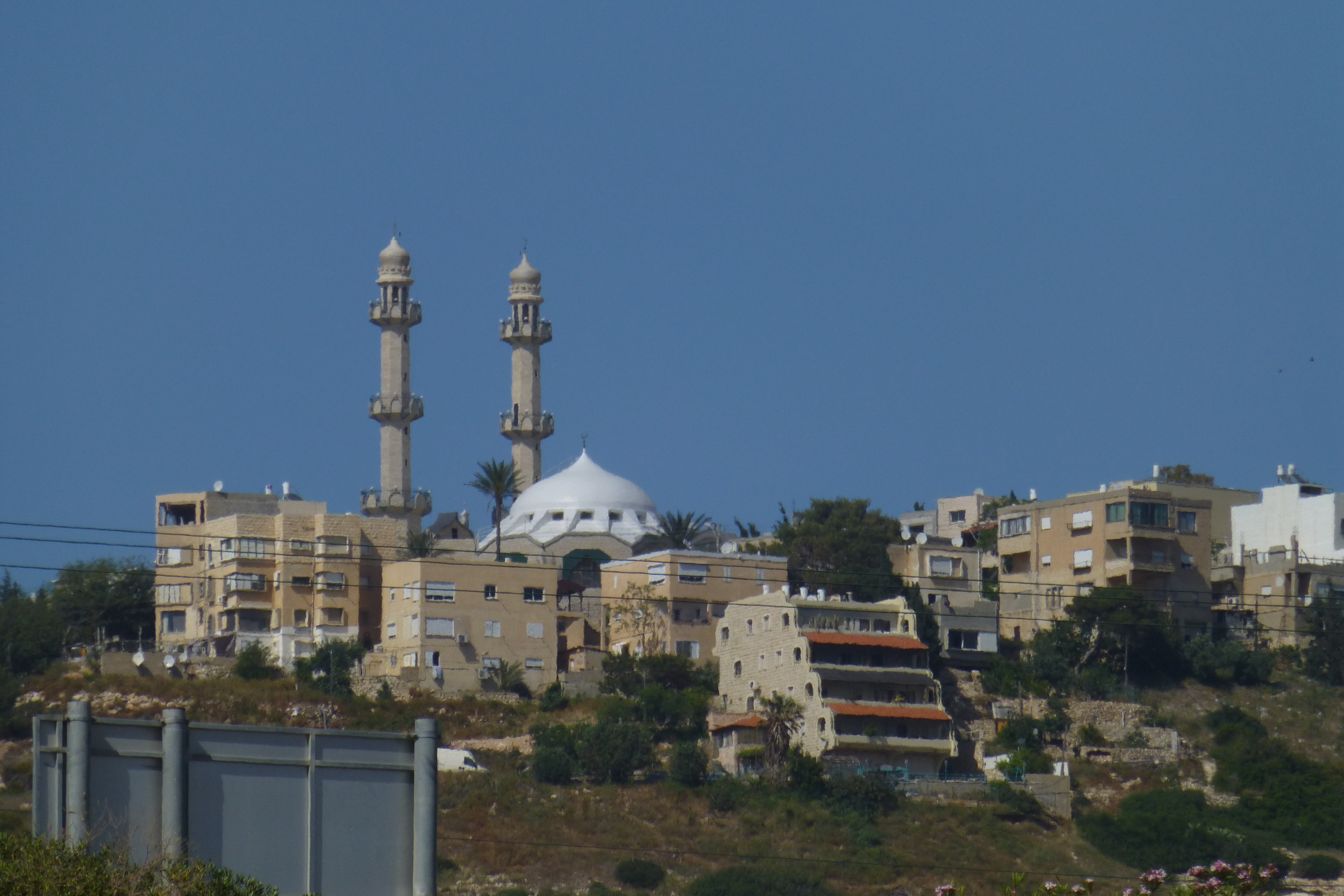 מסגד סיידנא מחמוד בשכונת כבביר בחיפה. מסגד זה משתייך לפלג האחמדים שנוסד בהודו ומטיף לנאורות, שלום ואהבה לאחר.